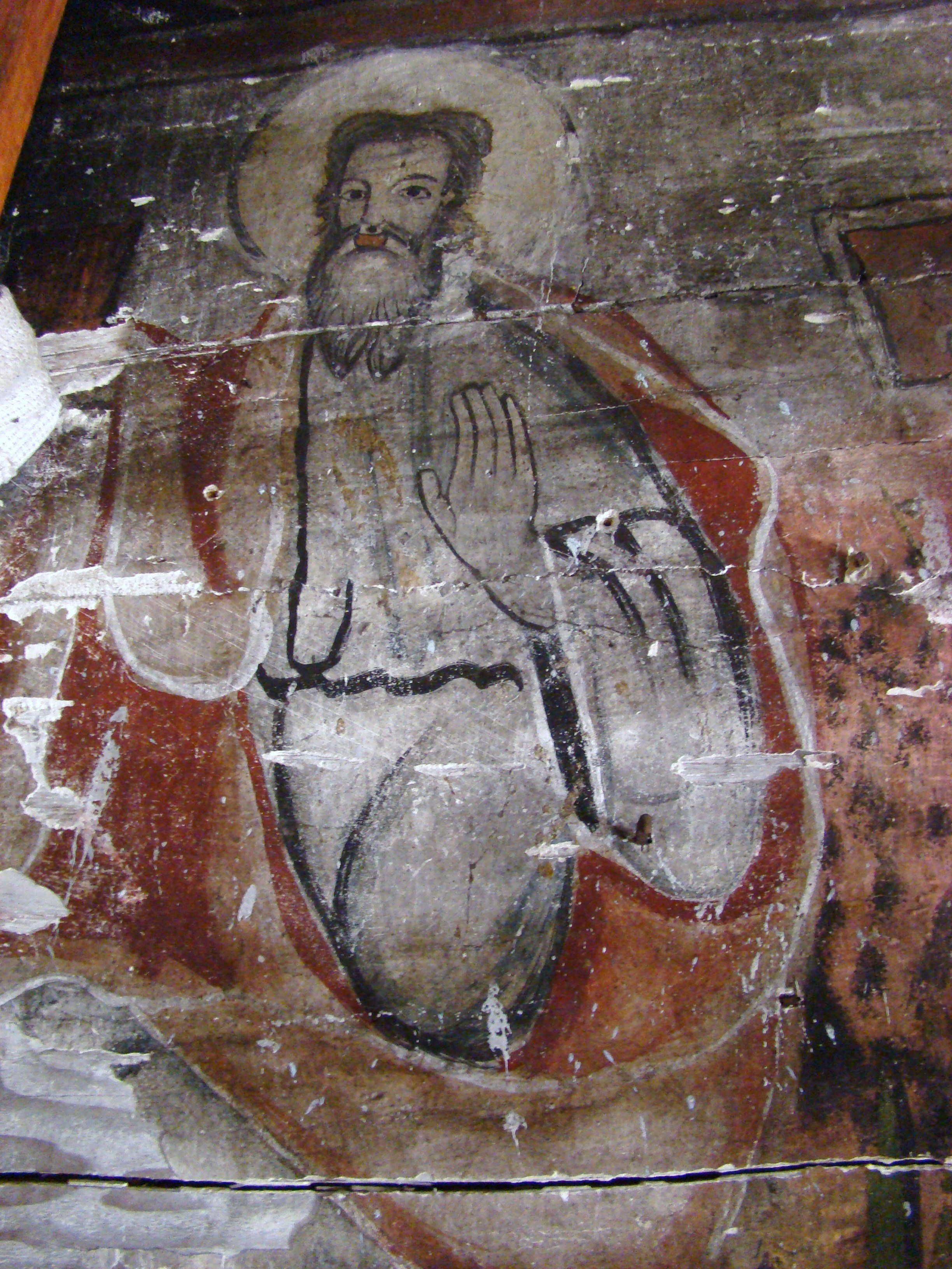 Dealu Geoagiului, județul Alba